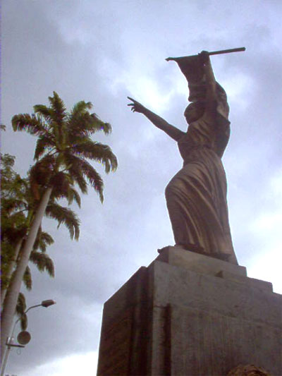 Monumento a Antonia Santos, Socorro, Santander, Colombia.